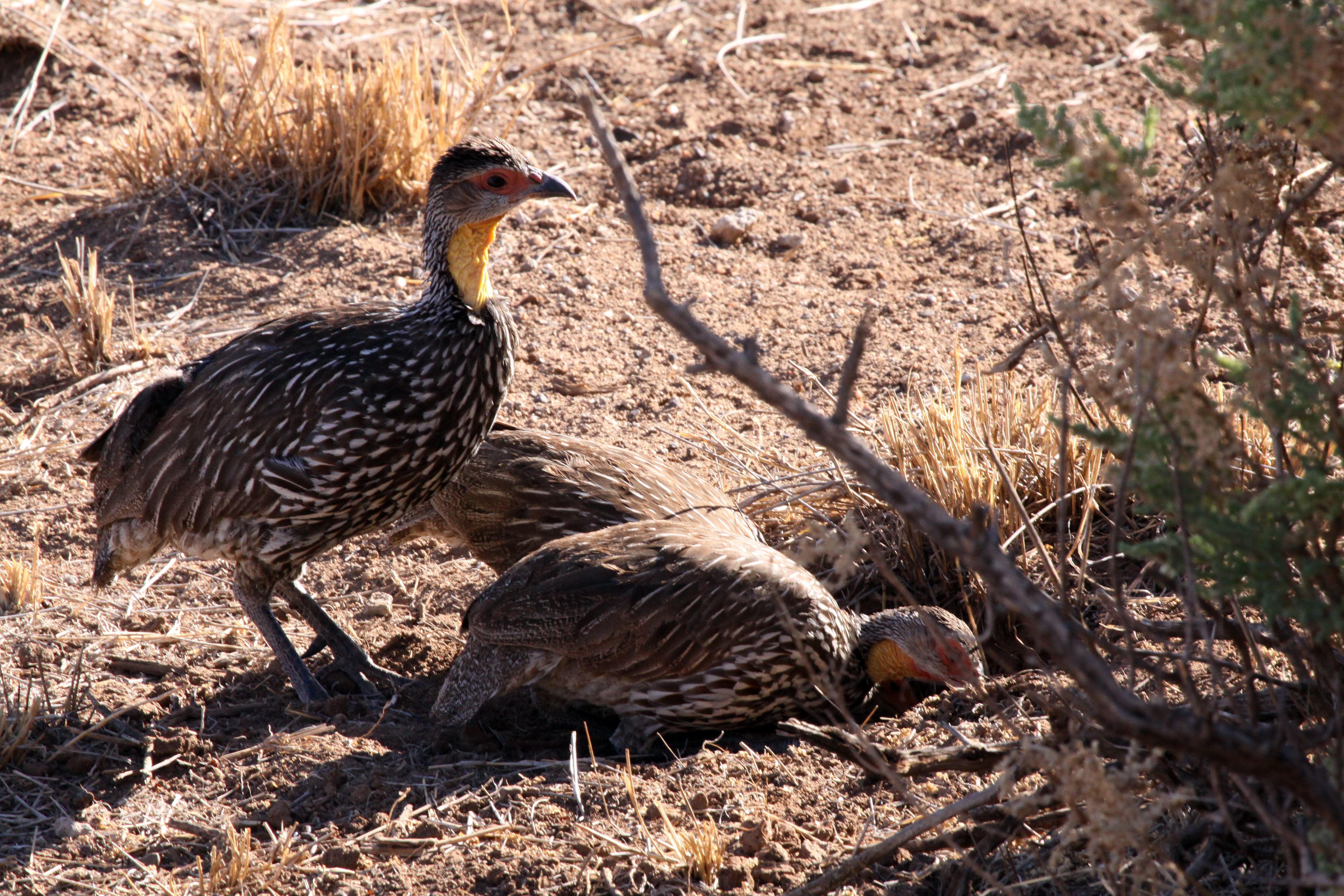 Francolins à cou jaune Pternistis leucoscepus